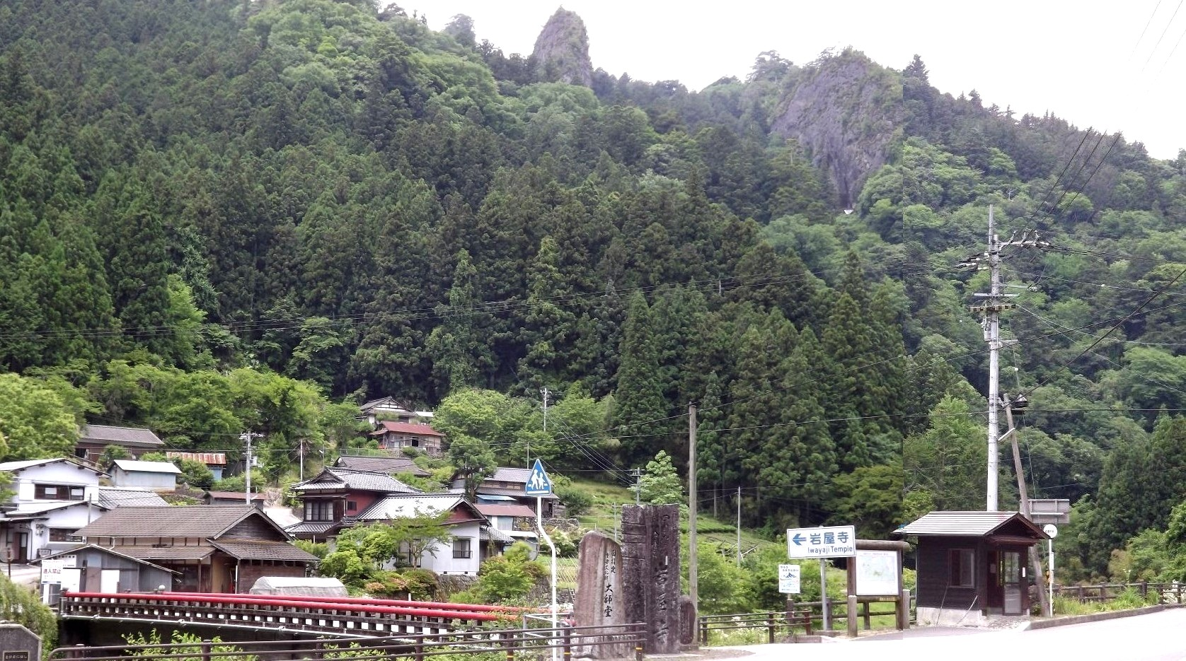 岩屋寺を県道入口から臨む